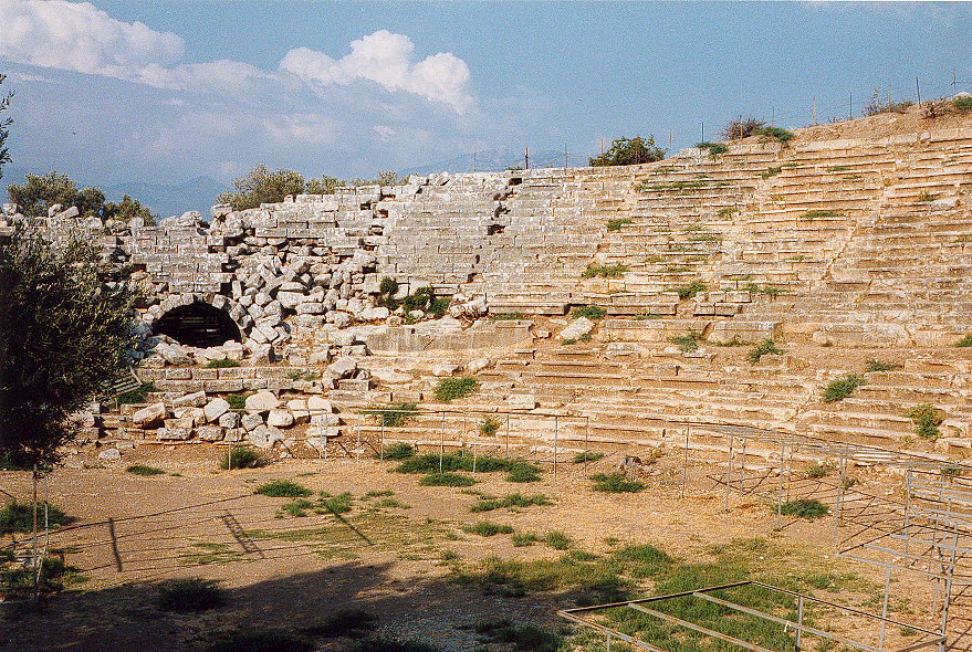 Hellinistisches Theater im Letoon - die Orchestra wird von den benachbarten Bauern zur Gemüseaufzucht und Gewürztrocknung genutzt.